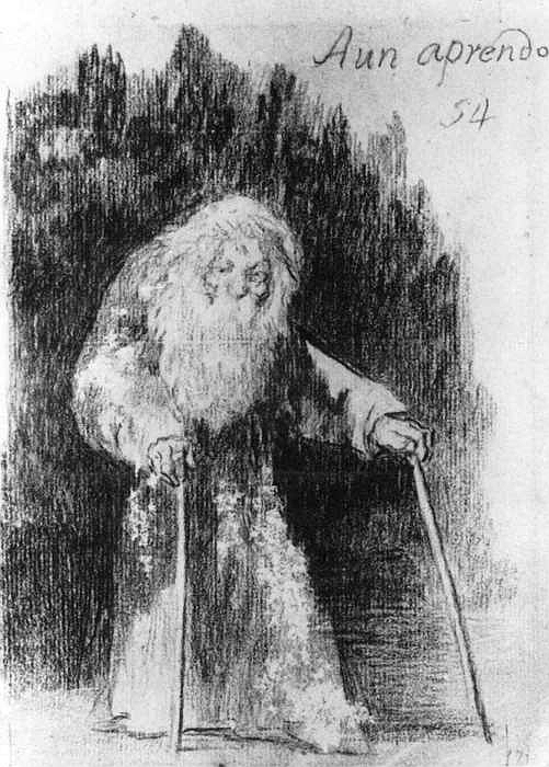 «Aún aprendo» (I am Still Learning), Black chalk, 195 × 150 mm. Museo del Prado, Madrid